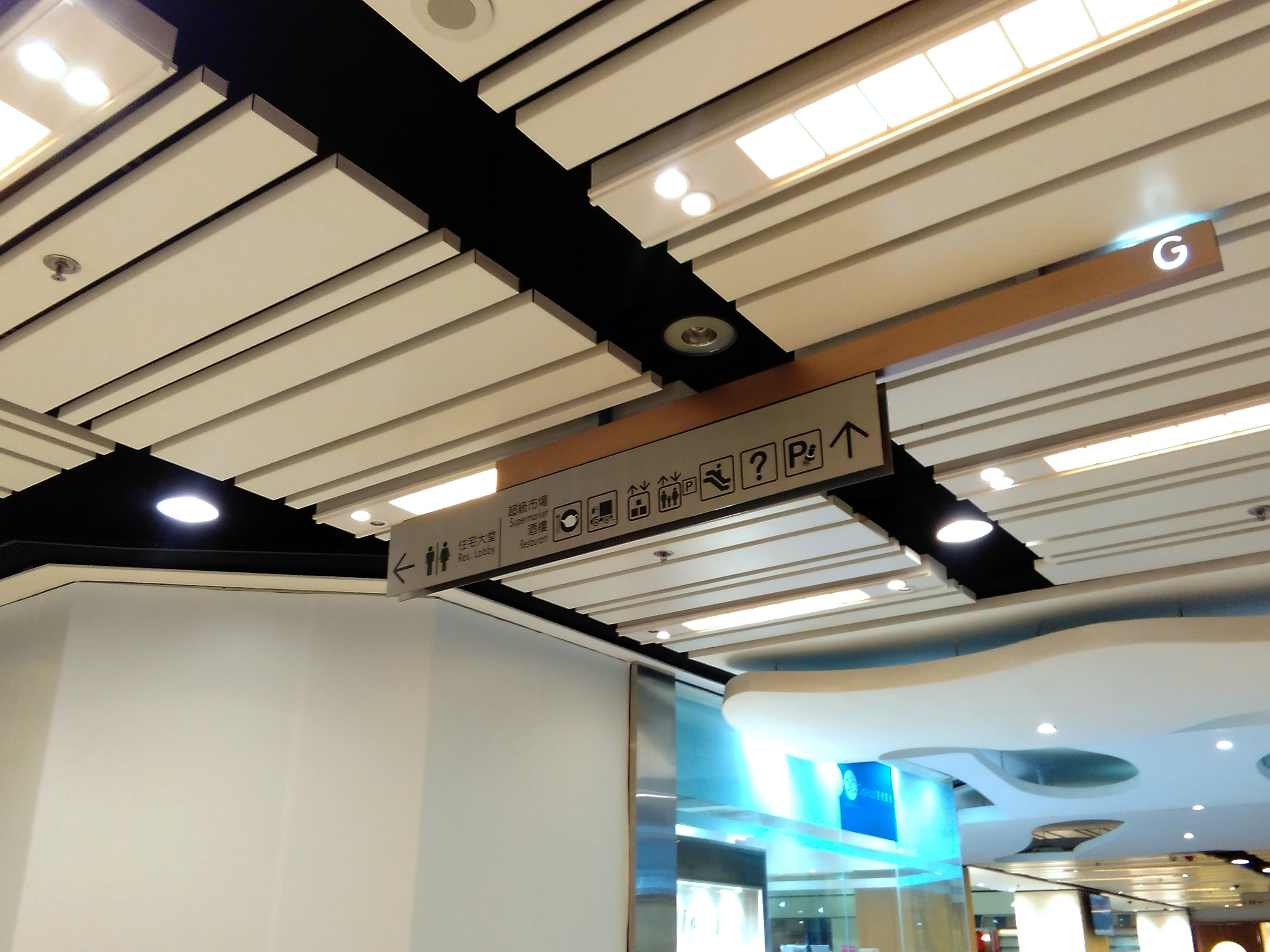 Nan Fung Plaza Shop signage in 2018